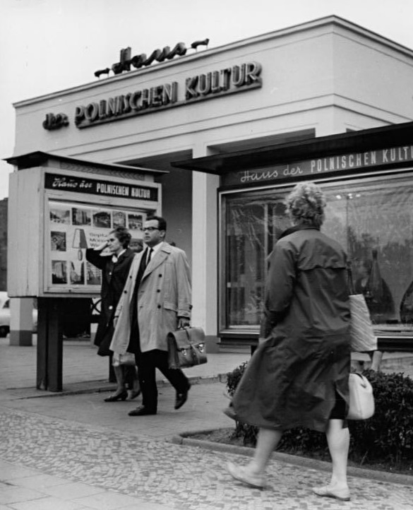 Berlin, "Haus der Polnischen Kultur" ADN-ZB Krisch Ge-Schm 27.9.1963 Berlin: Beliebter Anziehungspunkt der Berliner ist das Haus der Polnischen Kultur am Bahnhof Friedrichstraße